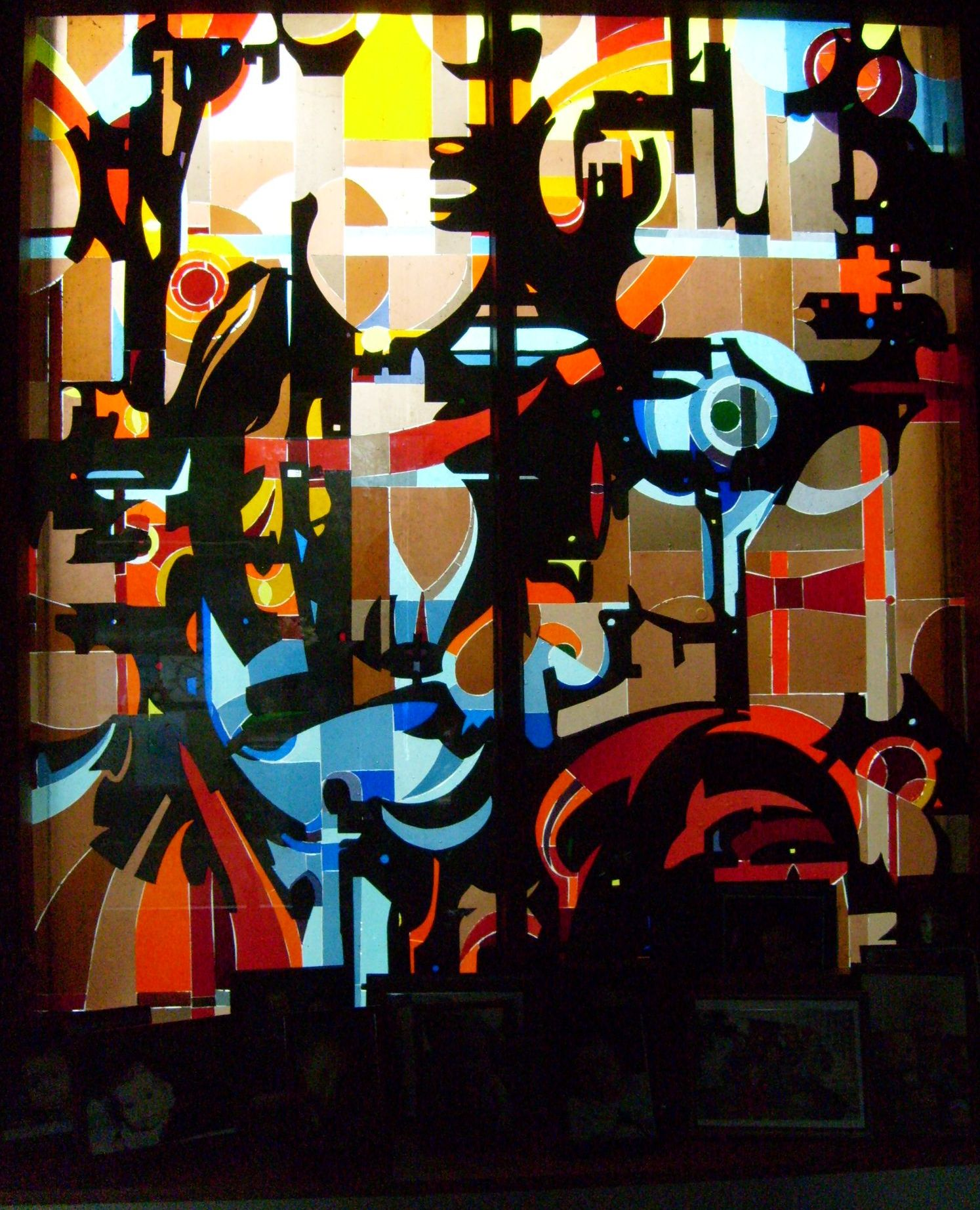 Fenster, gestaltet von Pit von Frihling, Wyk auf Föhr